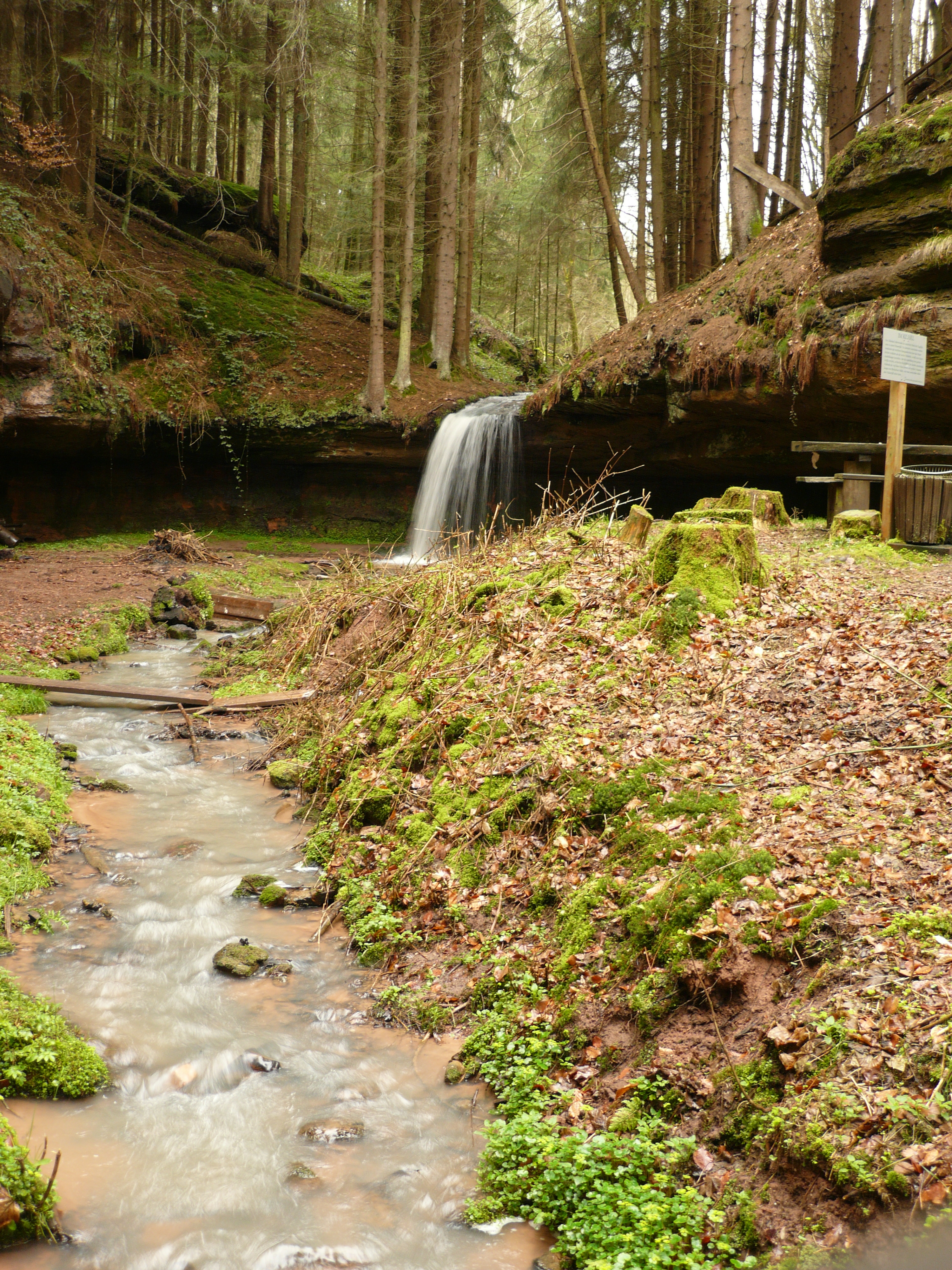 Odenbachtal near Herschberg/ Pfalz